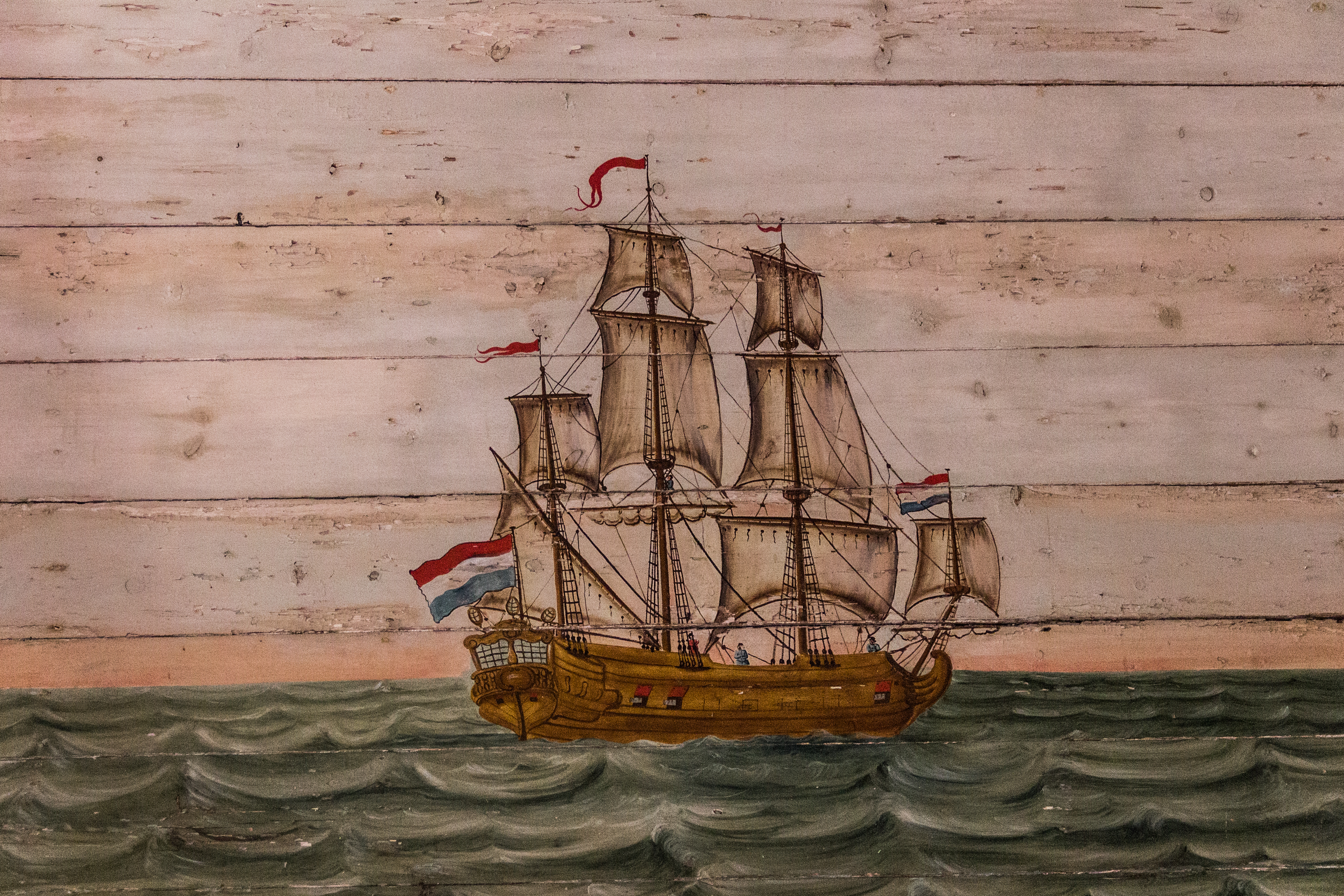 Palácio Nacional de Sintra